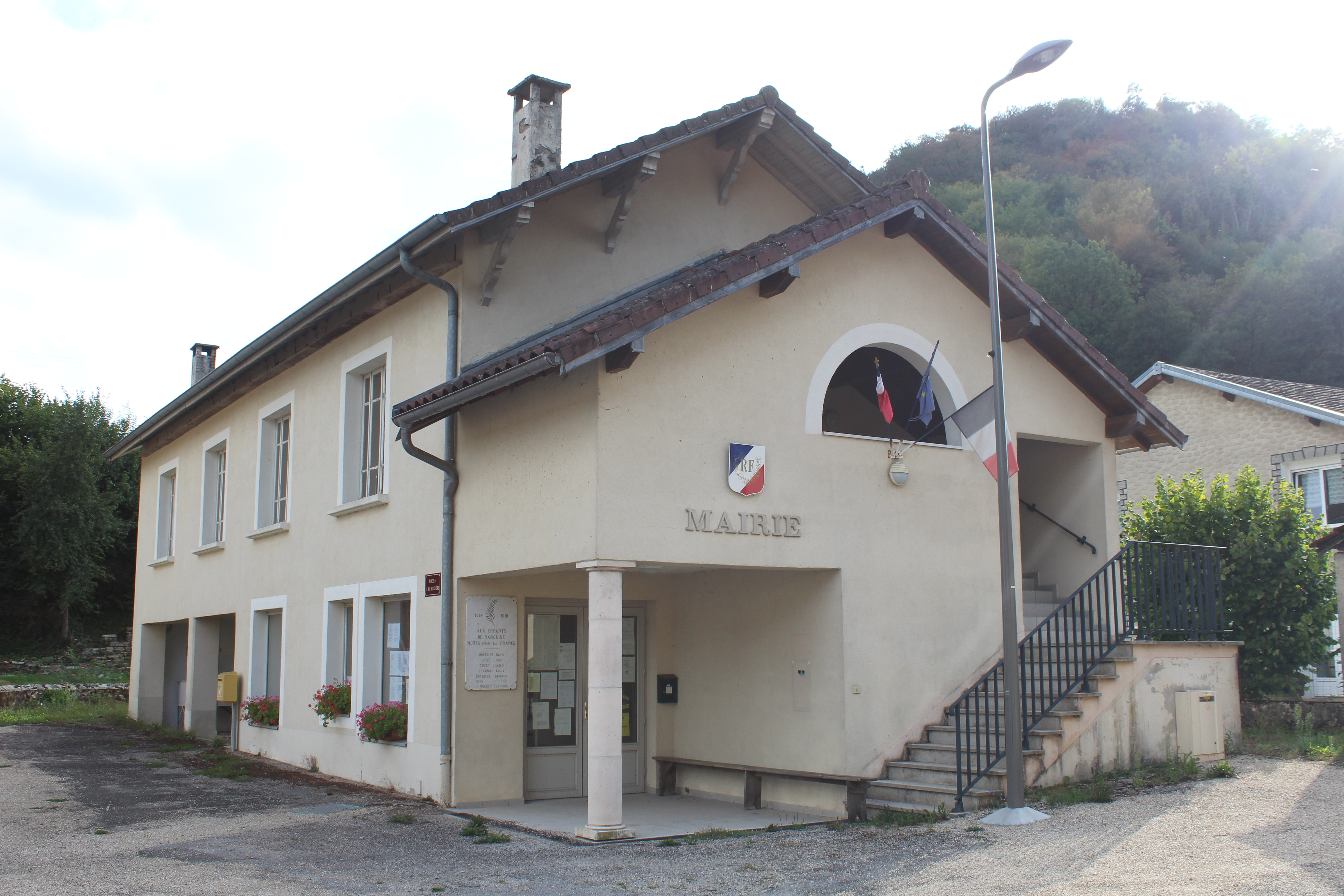 Mairie de Nancuise.